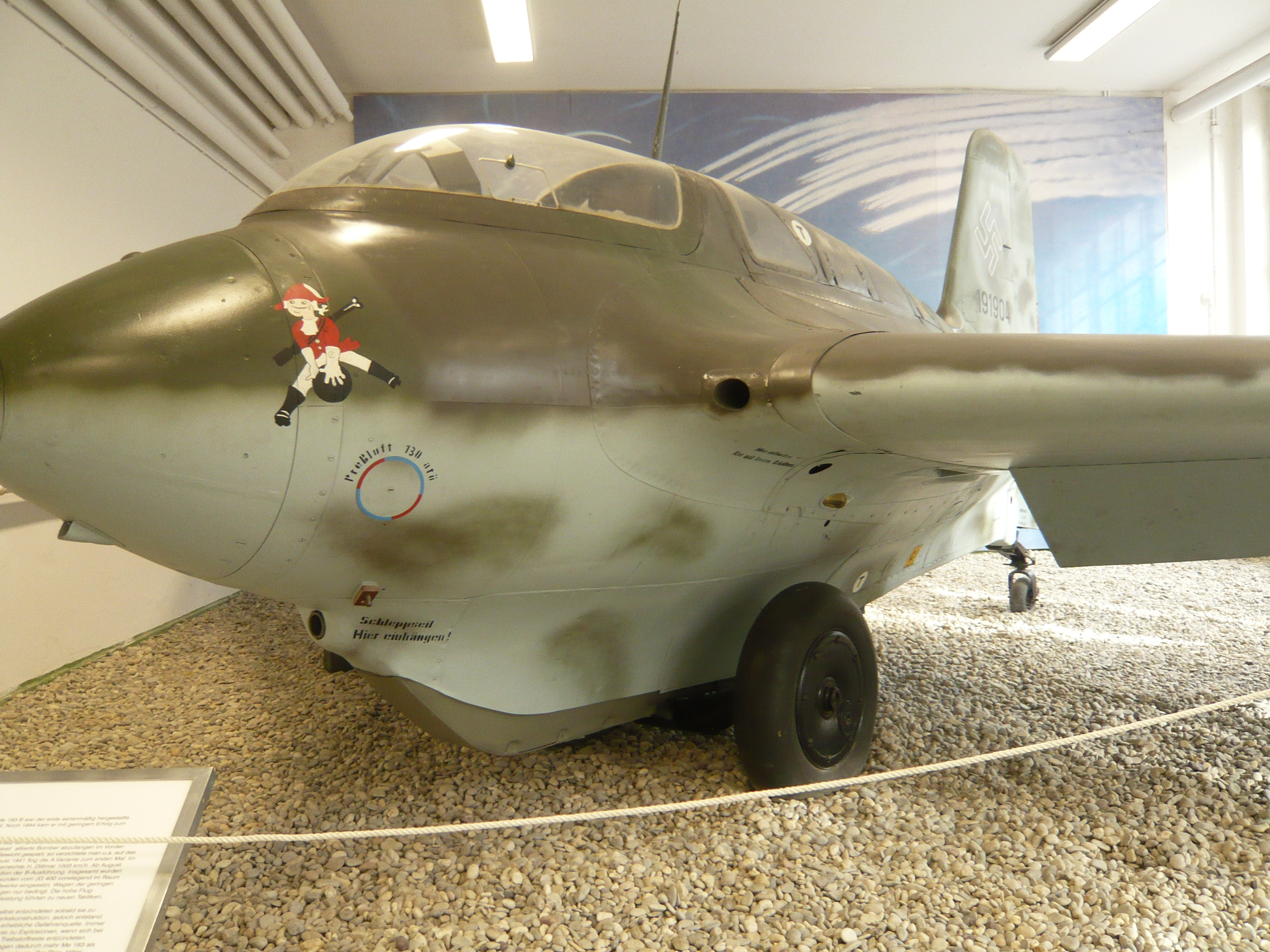 Me 163 Komet